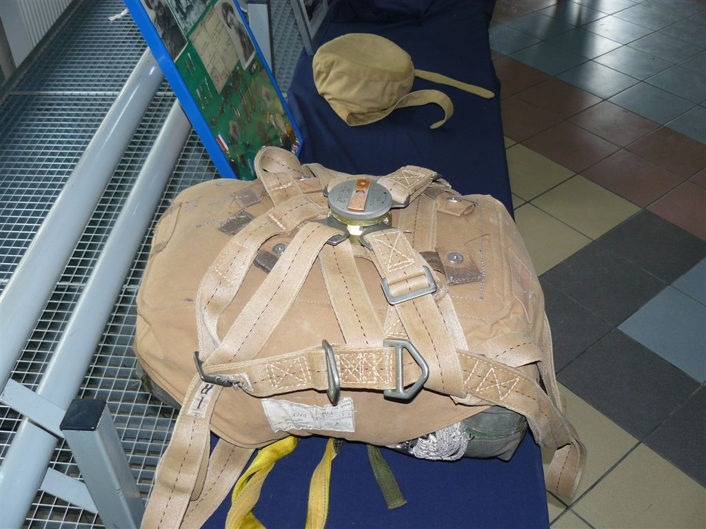 Spadochron Irwin używany przez „cichociemnych“